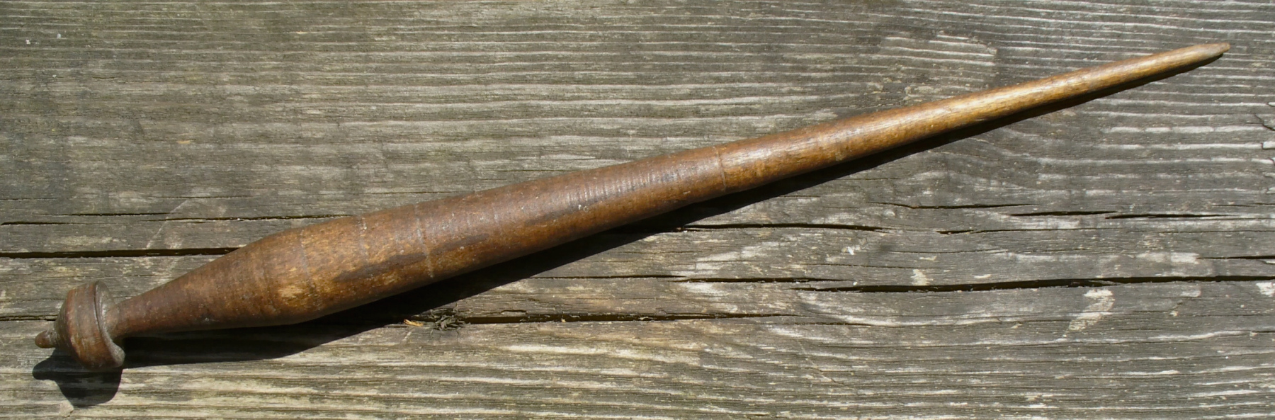 Веретено. Витебская обл. Середина 20 века.